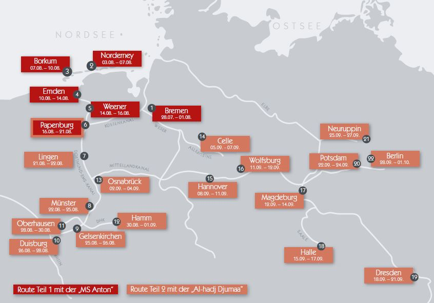 Die Route der MS Anton und der Al-hadj Djumaa im Sommer 2017 im Rahmen des sozial-kulturellen Schiffsprojekts zu Flucht und Migration "Mit Sicherheit gut ankommen"